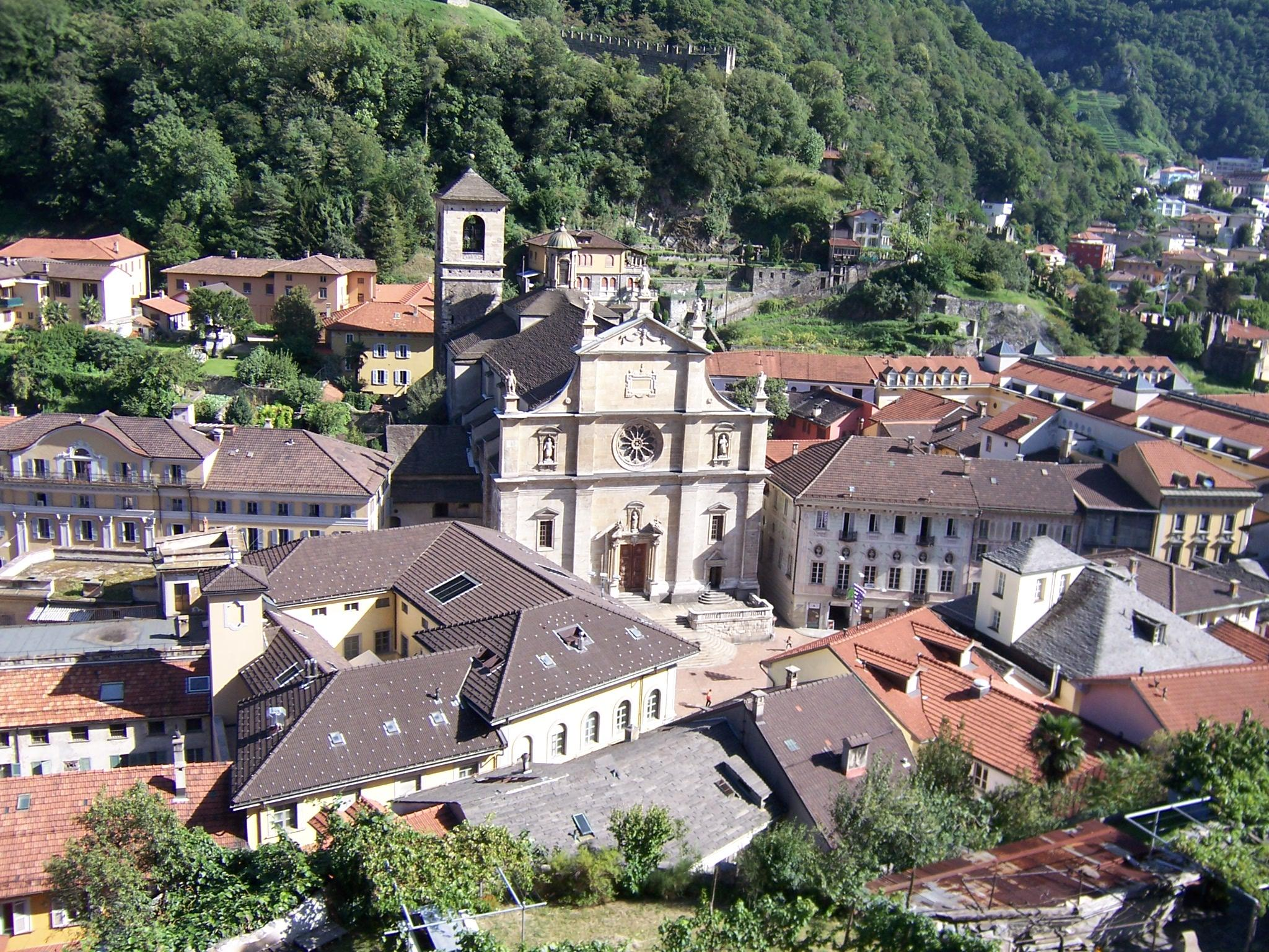 Blick auf die Altstadt von Bellinzona (Kanton Tessin / Ticino, Schweiz) von der Burg Castelgrande